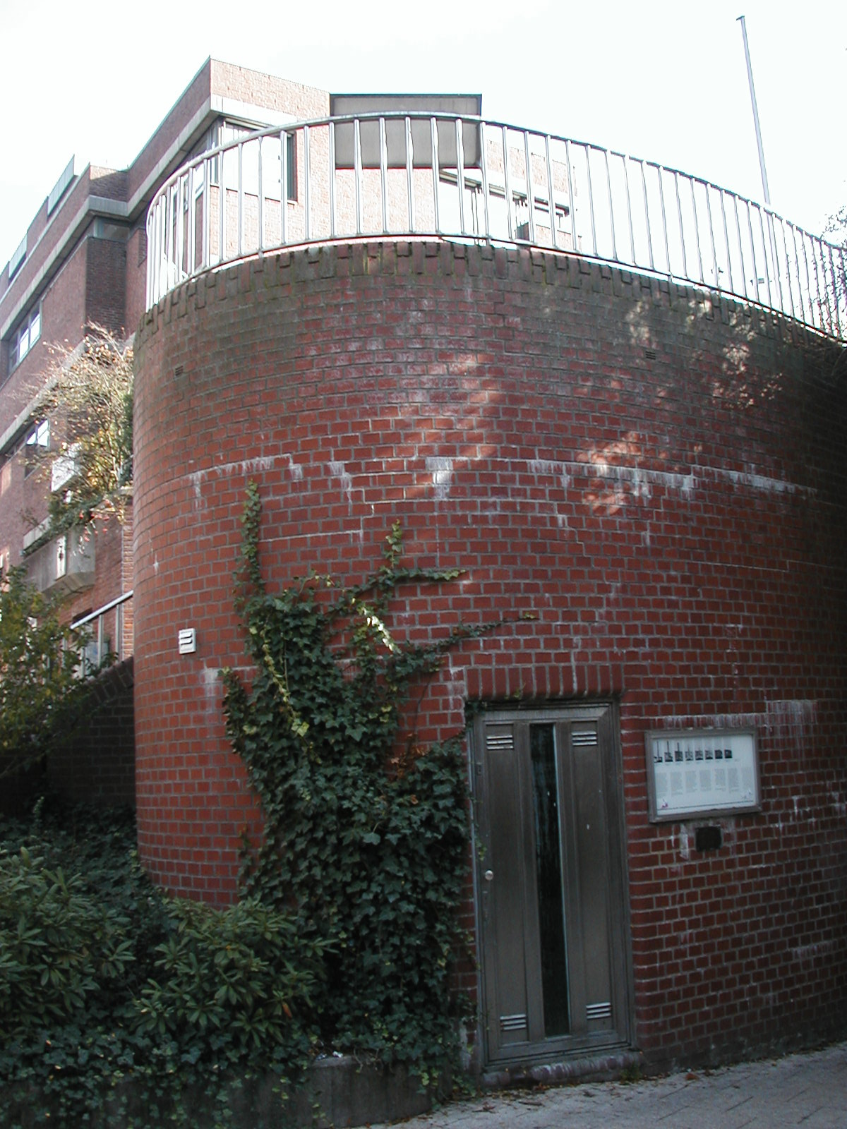 Jochen Gerz' Harburger Mahnmal gegen den Faschismus, vom Sand aus gesehen. Hinter dem Fenster könnte man die Bleisäule erkennen, wenn es nicht so verschmutzt wäre